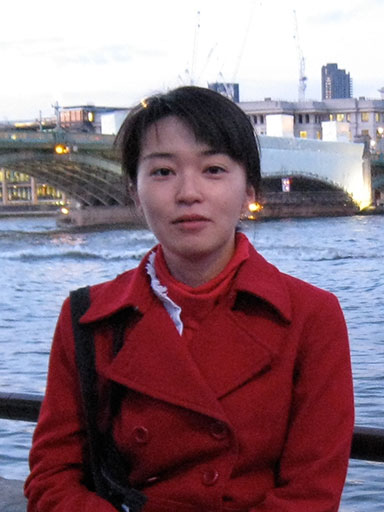 ウィキペディア15周年記念ウェブサイトに掲載された北村紗衣氏。